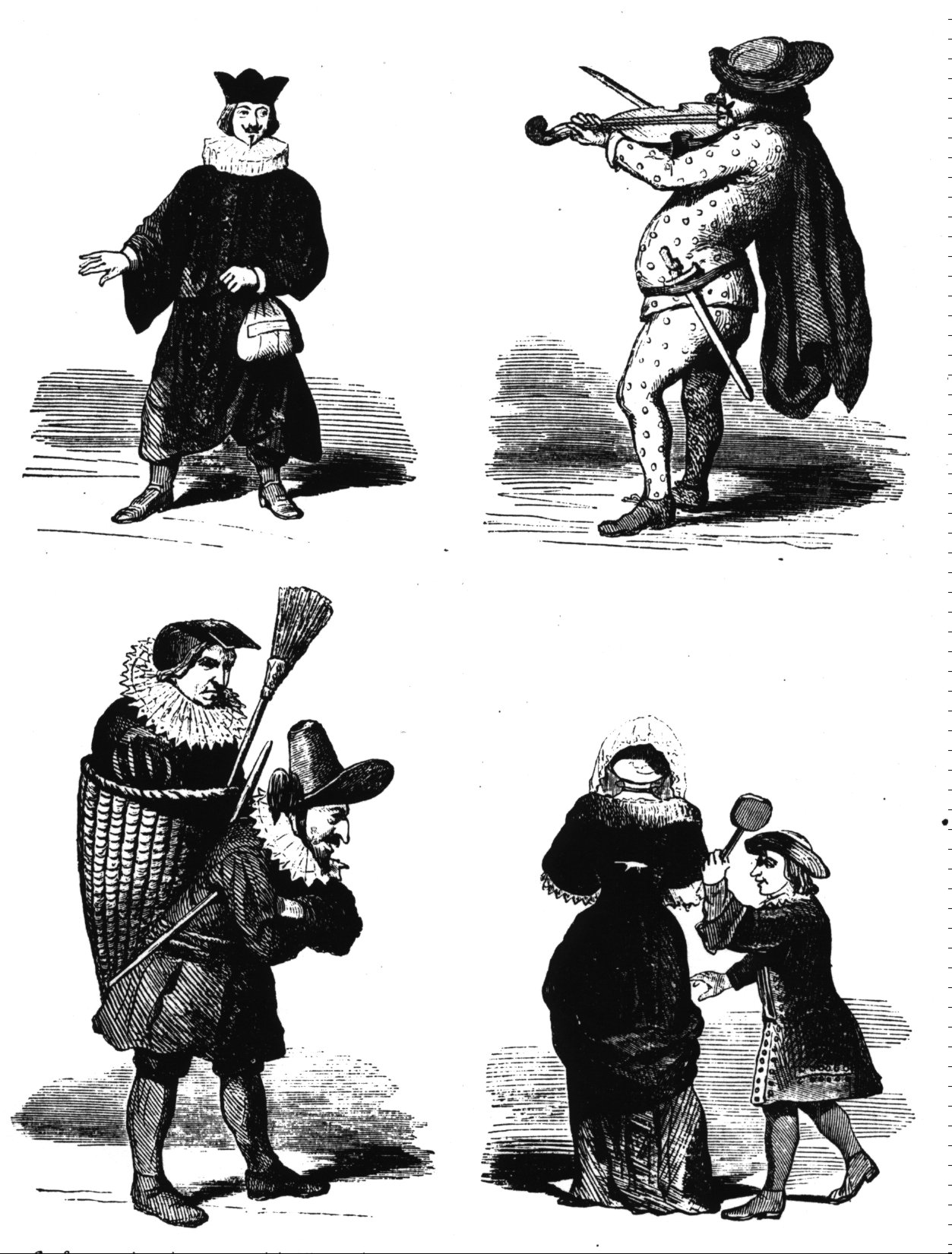 Reproduction gravée en 1852, de détails d'une gouache du XVIIème siècle, représentant, en miniatures sur parchemin, des scènes du Mardi Gras, rue Saint-Antoine, à Paris. Cette oeuvre était conservée, en 1852, dans la collection de M. Bonnardot.